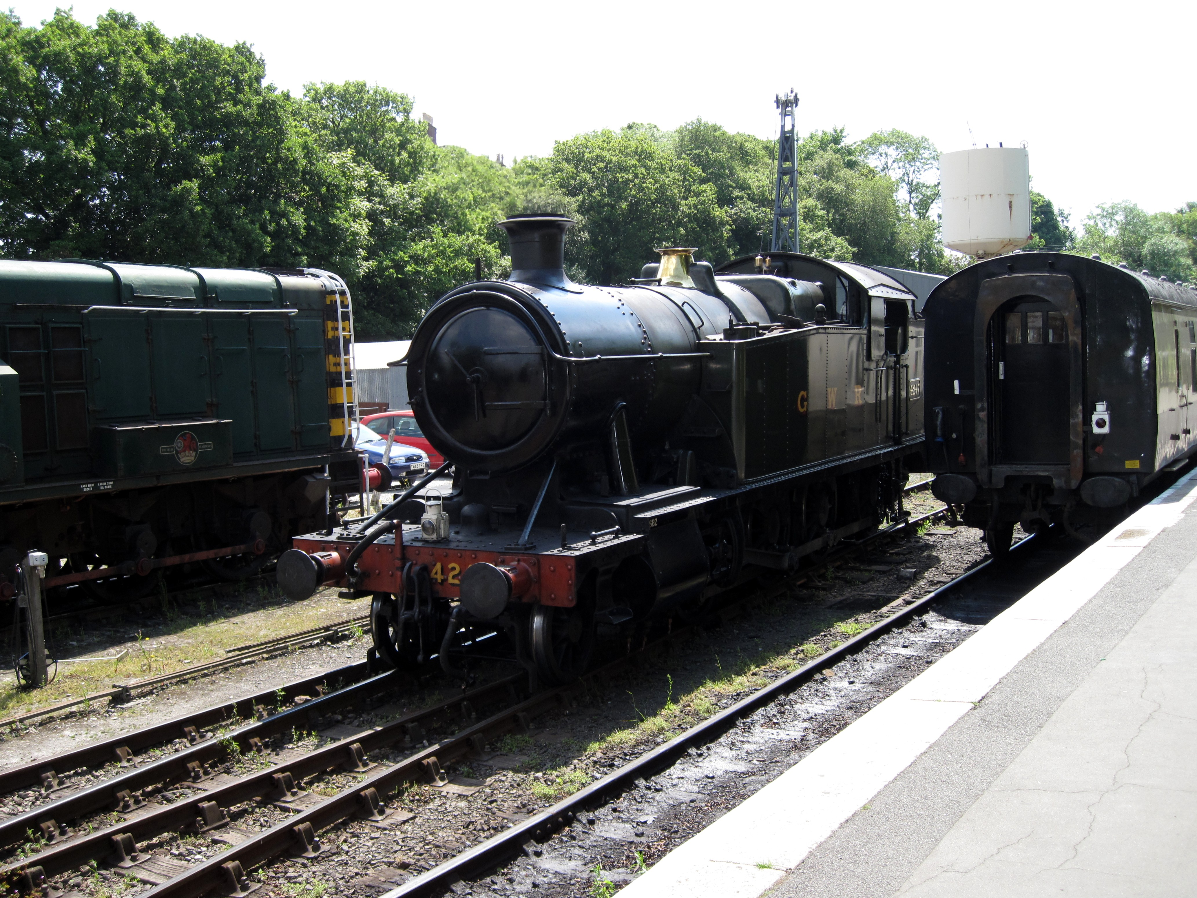 Lokwechsel der Museumsbahn im Bahnhof Bodmin General in Bodmin, Cornwall, Großbritannien